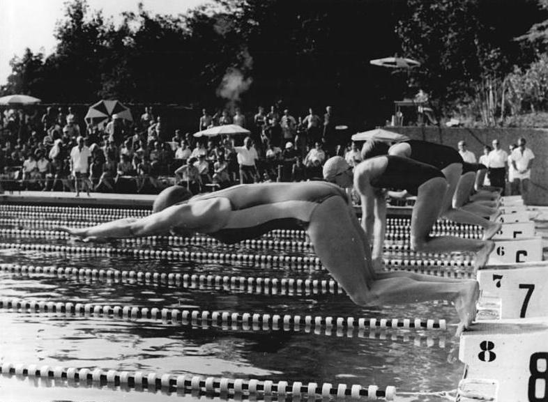 Martina Grunert, Renate Vogel Zentralbild Liebers 9-7-70-Brandenburg: XXI. DDR-Meisterschaften im Sportschwimmen im neu eröffneten Volksbad von Brandenburg-Havel (2. Wettkampftag)-Start zum Finale über 100 m Brust der Damen. Im Vordergrund Martina Grunert (SC DHfK Leipzig-5.Platz), dahinter auf Bahn 7 Renate Vogel (SC Karl-Marx-Stadt).